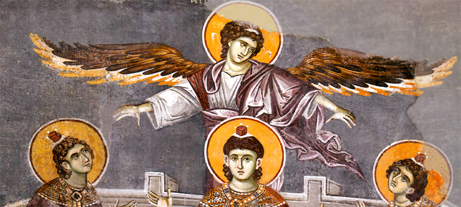 Τρεις Παίδες εν τη Καμίνω, ΒΔ Διάχωρο, Δ τοίχος, 3η ζώνη (~1289-1293)